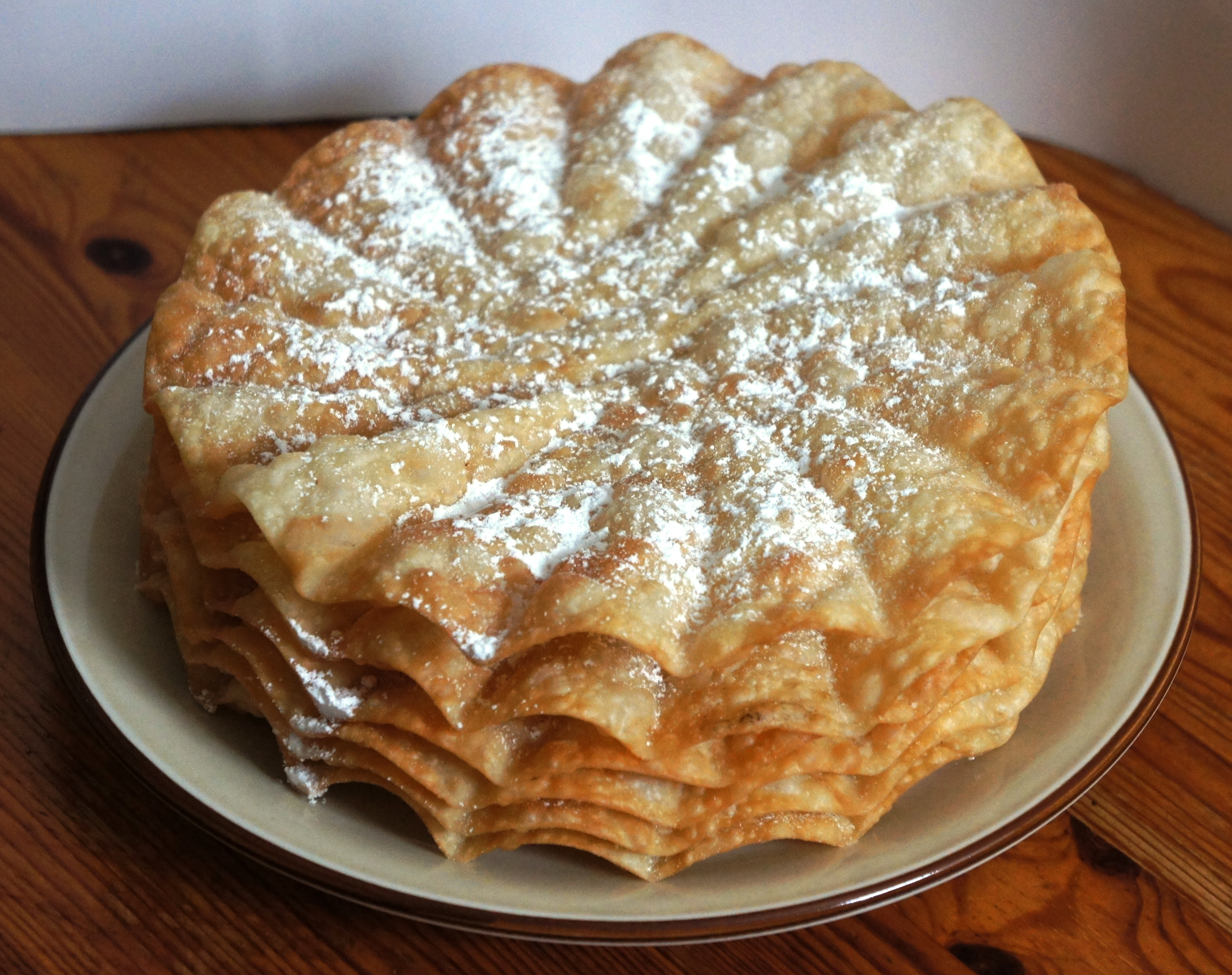 Sechs Stück Fasnachtschüechli, seitliche Ansicht.